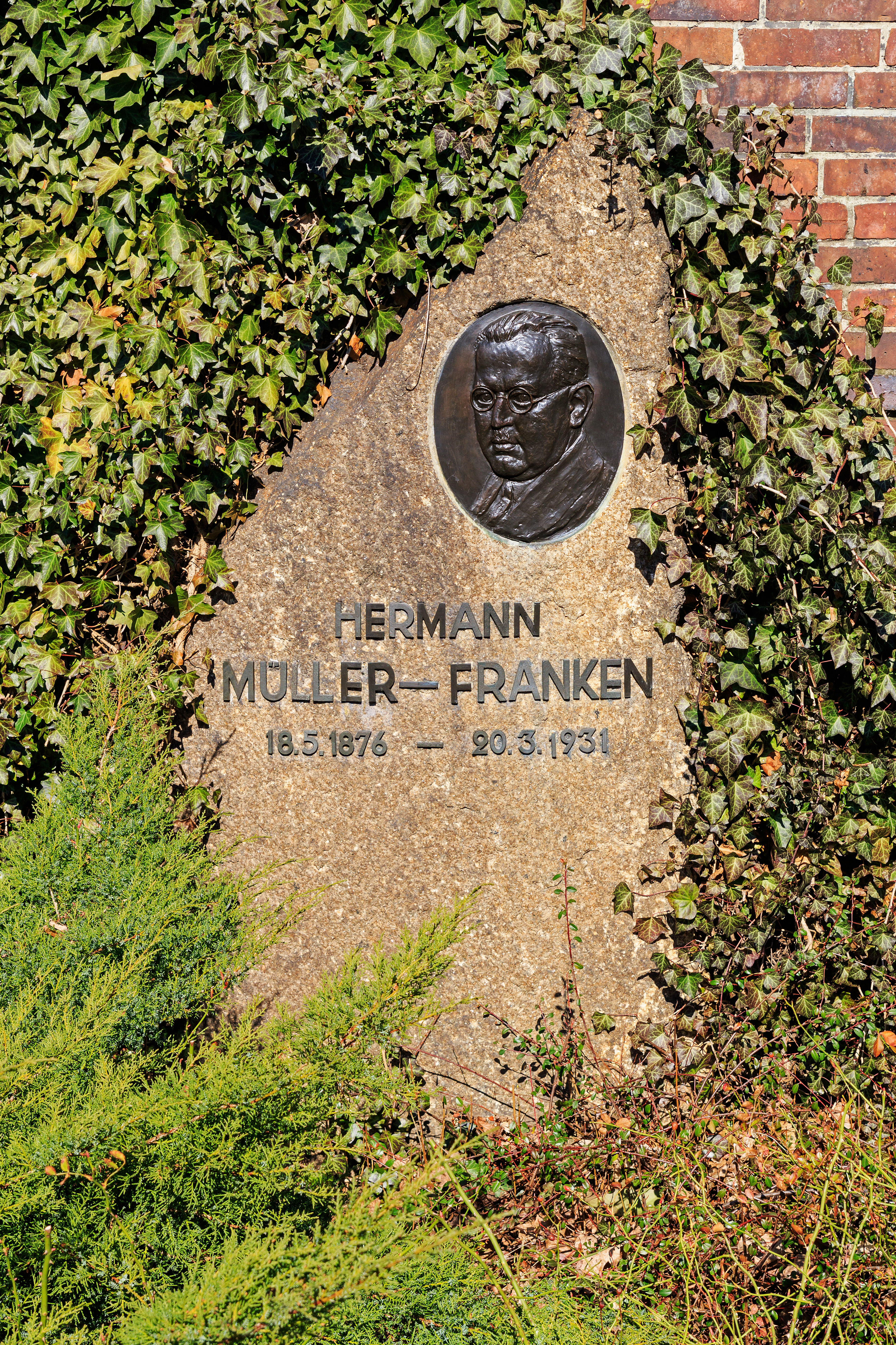 Zentralfriedhof Friedrichsfelde, Berlin-Lichtenberg. Gedenkstätte der Sozialisten, Grab von Hermann Müller-Franken.